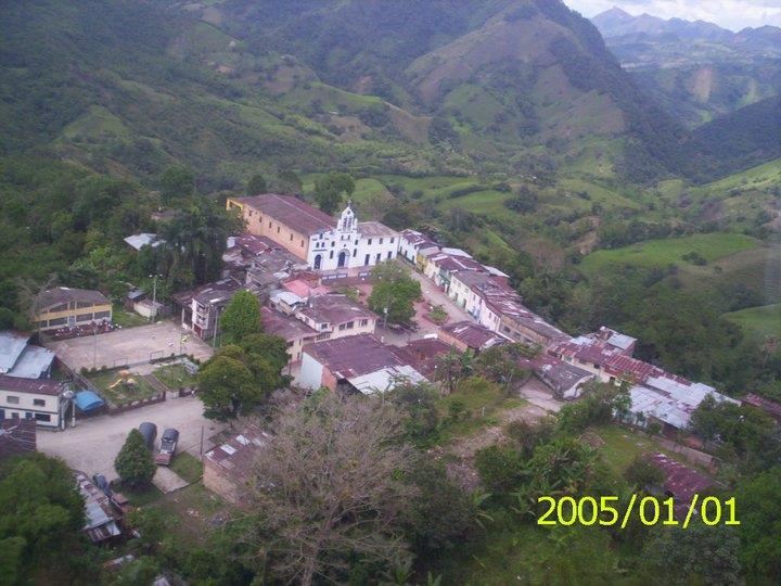 Tomado de un miembro aportante de Topaipí